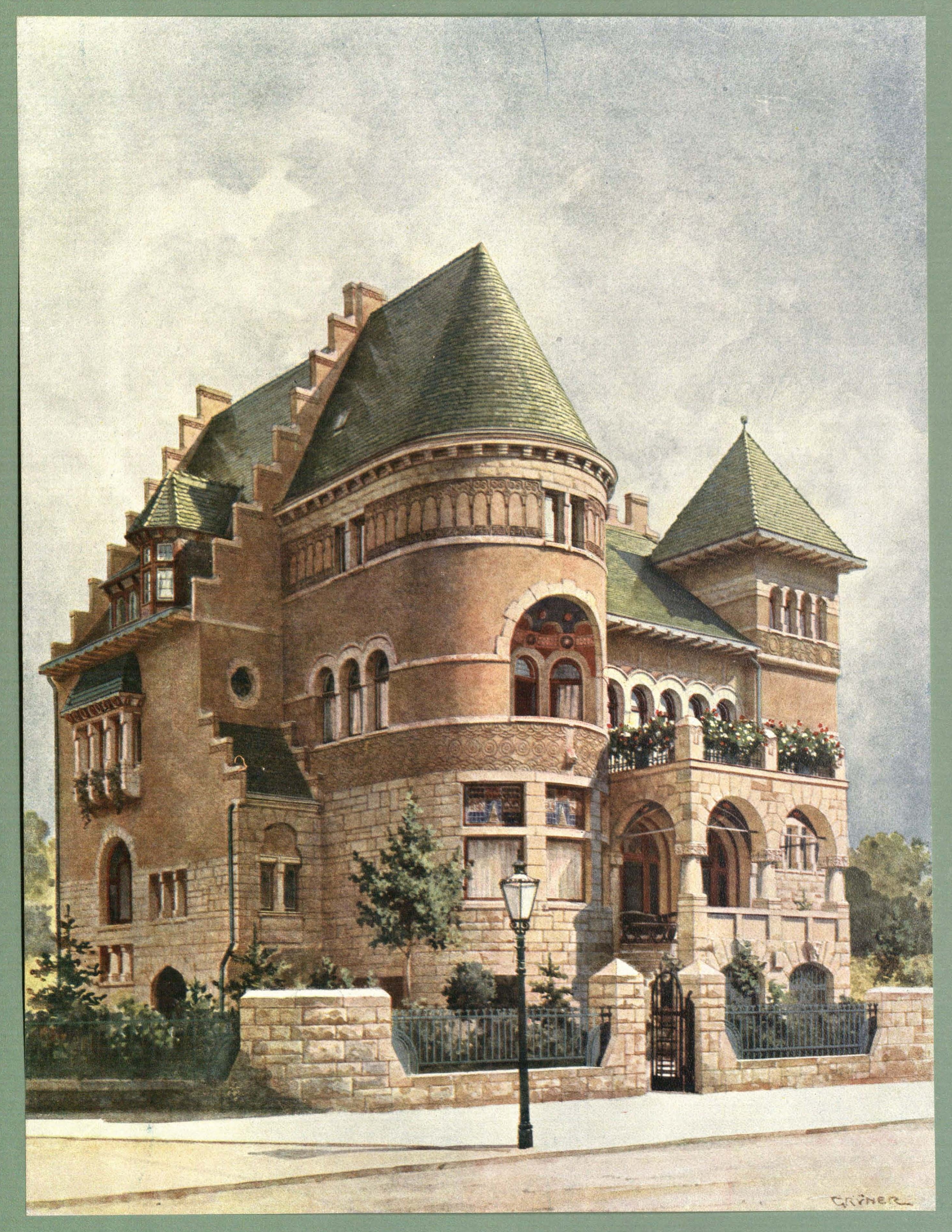 Villa für Karl Flemming, Hindenburgstraße 45 (früher Tiergartenstraße 45), nicht erhalten, in Hannover, Architekt: Ferdinand Eichwede. Tafel 46 aus Oscar Grüner: Moderne Villen in Meisteraquarellen. Serie II. 64 Tafeln. Verlag Friedrich Wolfrum & Co. Wien und Leipzig ca. 1905.